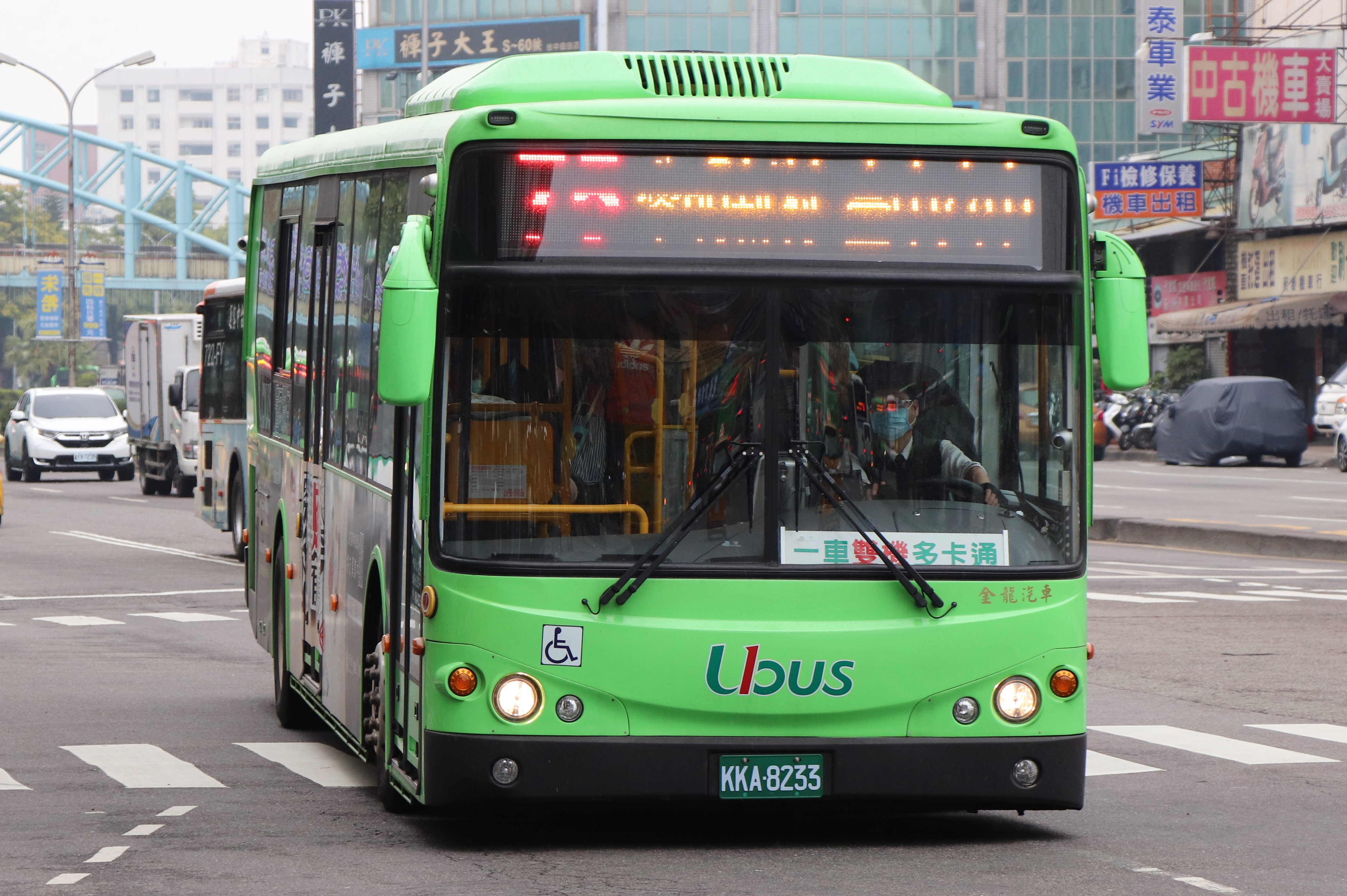 統聯客運 中興金龍KL6120U1大客車 KKA-8233